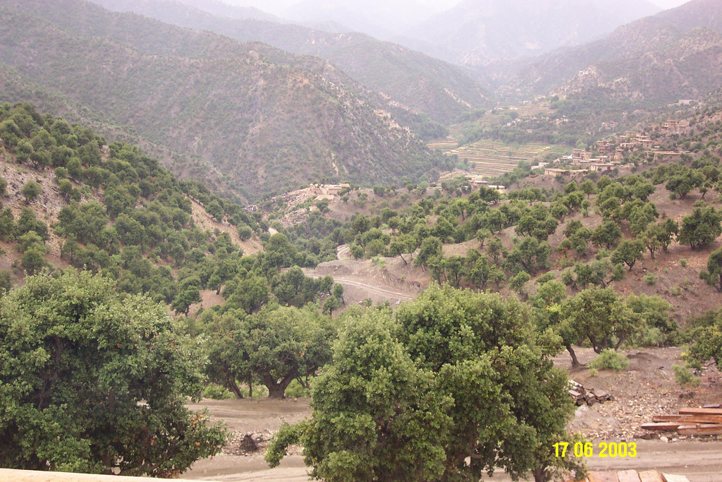 Bibiyal, Korengal Valley, Kunar Province, Afghanistan.